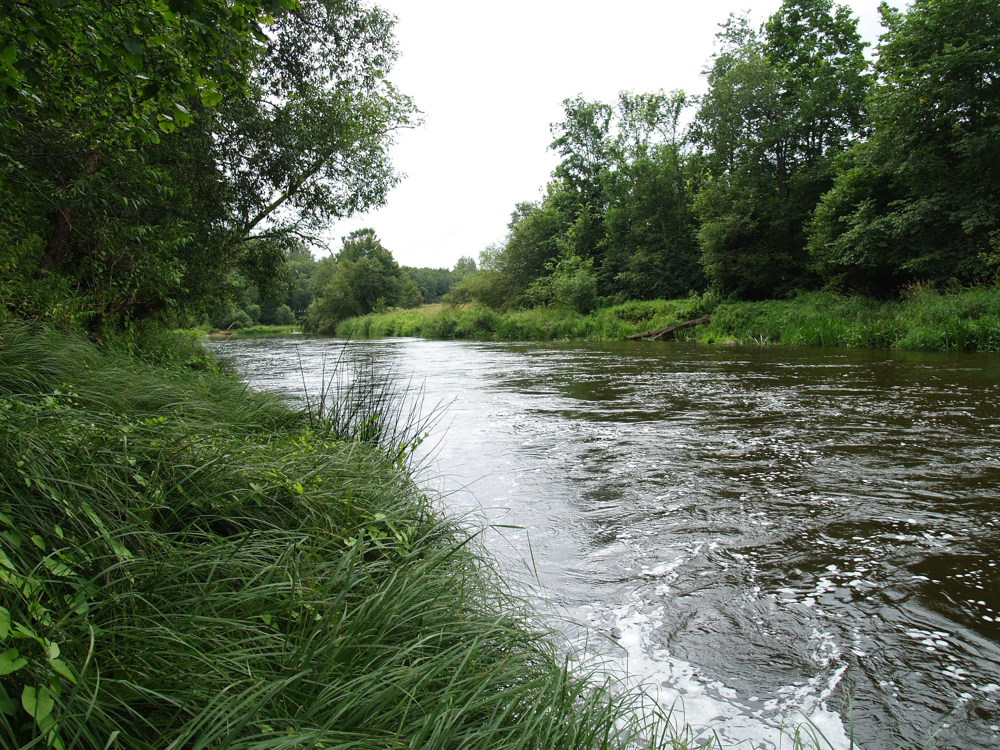 Salaca jõgi Vīķi külas otse Vīķi mõisa taga.